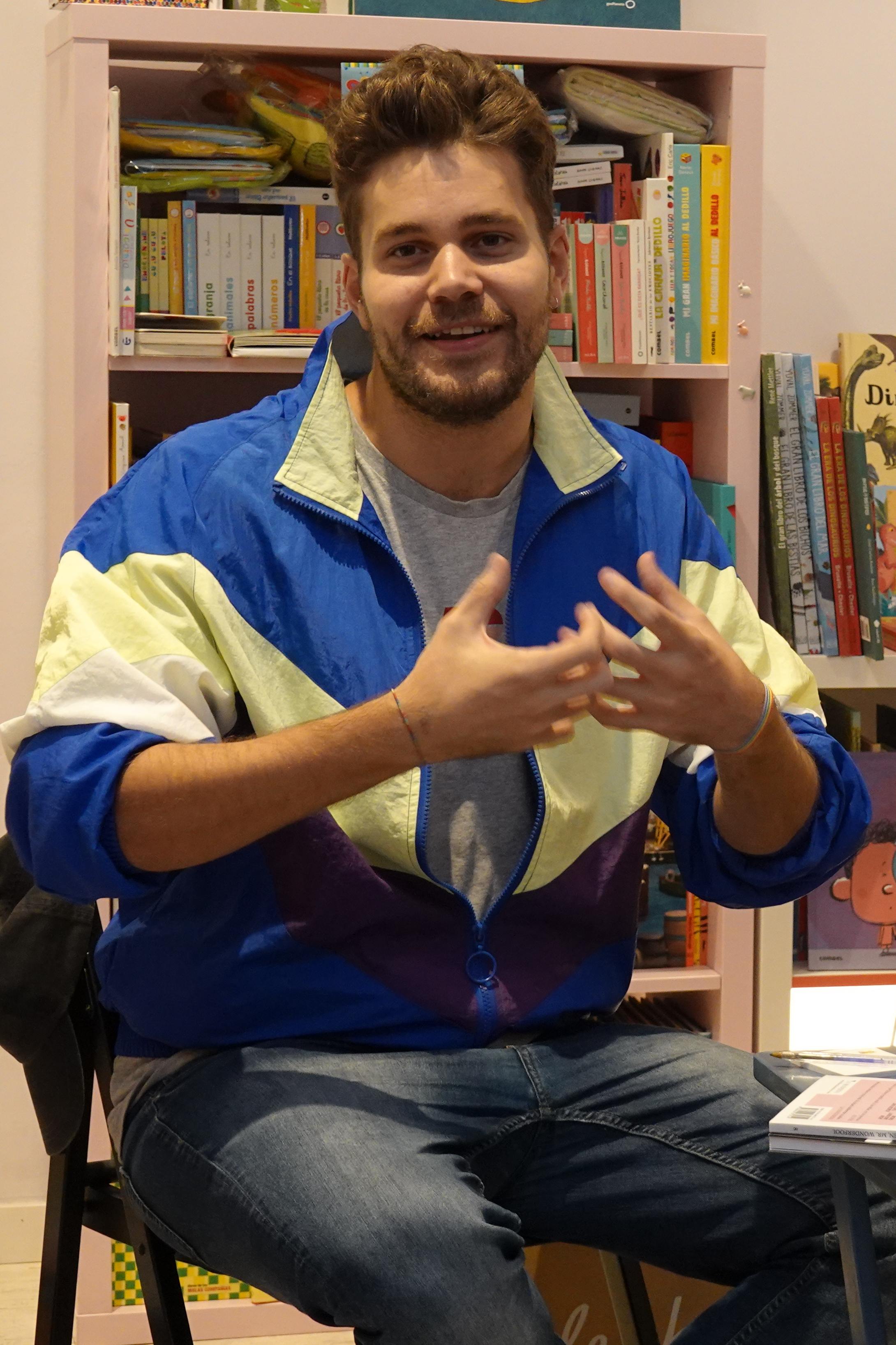 Lluis Mosquera en una presentación de un libro.